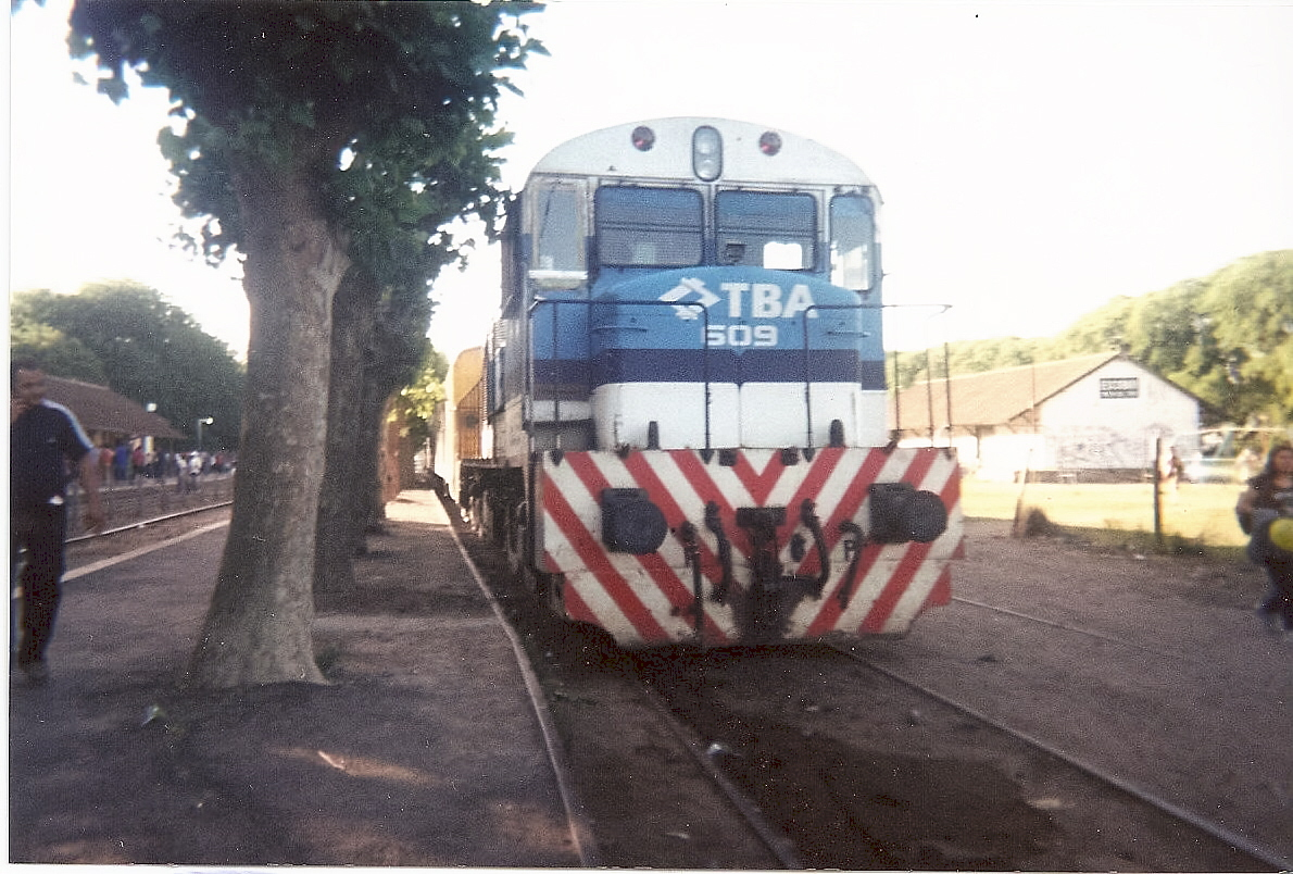 Locomotora GAIA en estación Escobar-Buenos Aires.